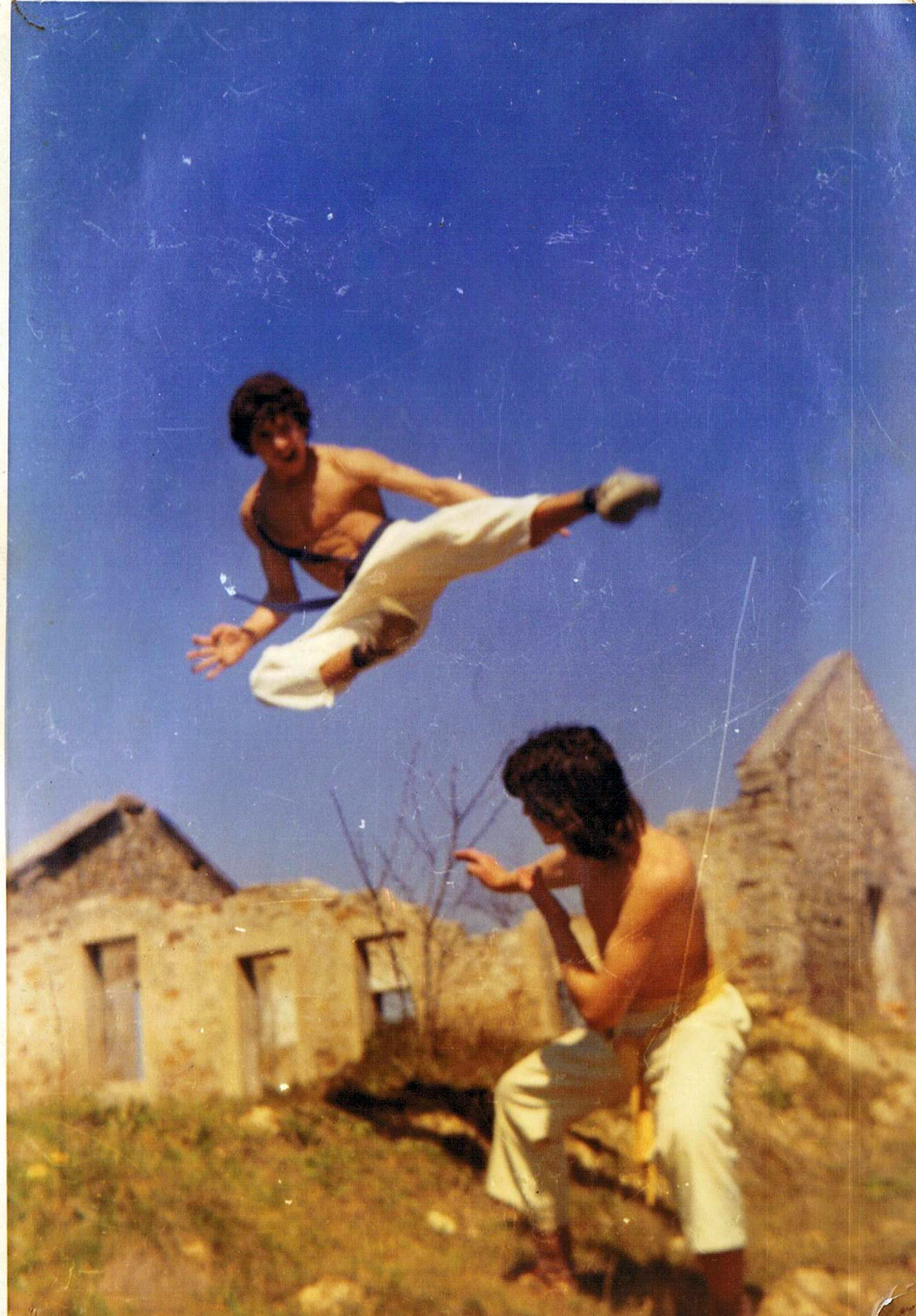 juan luis garcia delgado